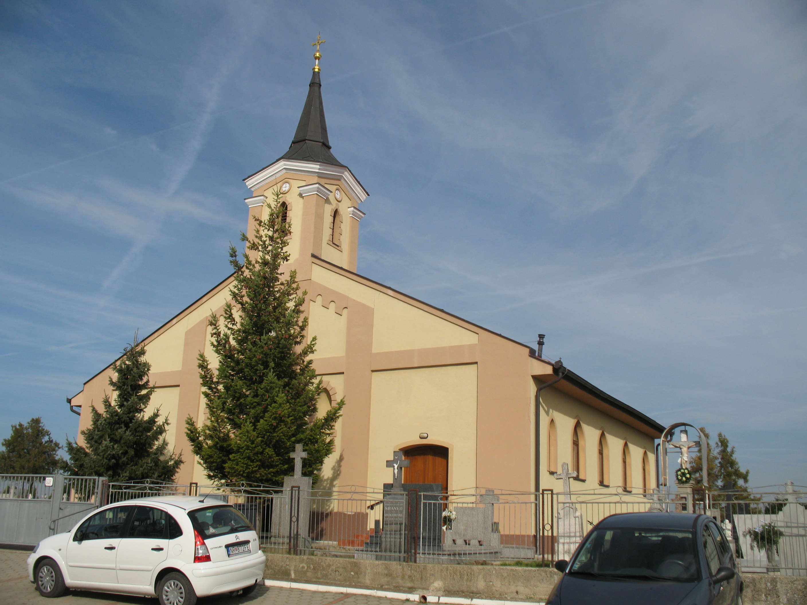 Bábindal